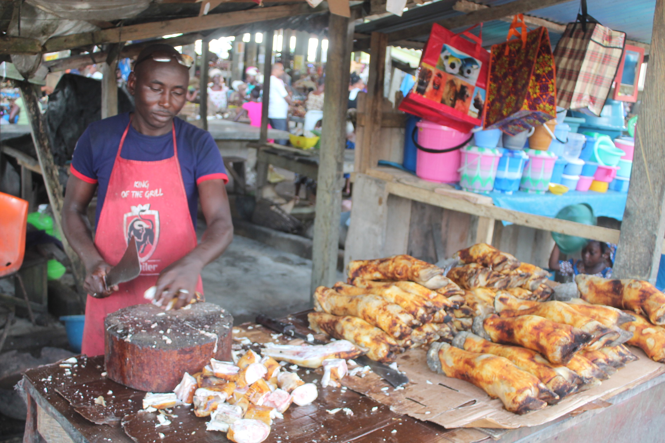 Boucher de porc fumé à Aboisso découpant sa viande avec une machette This is an image of "African people at work" from Ivory Coast